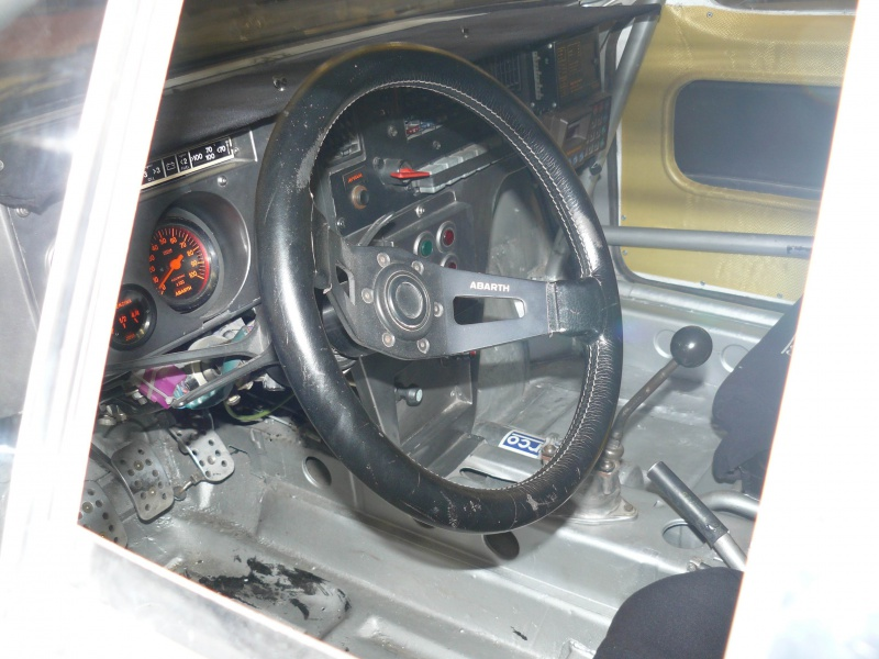 Retromobile 2012